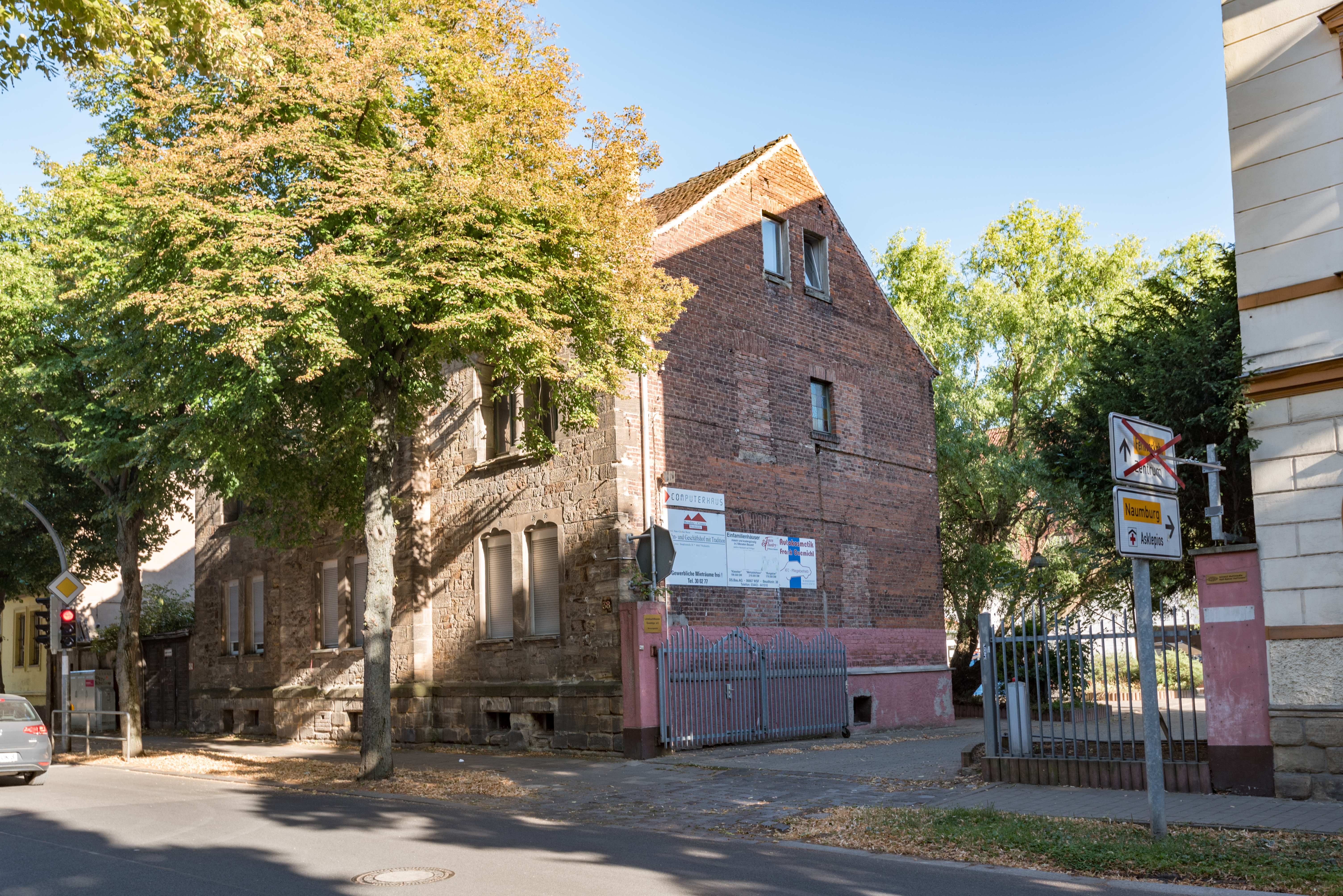 Weißenfels, Beuditzstraße 38